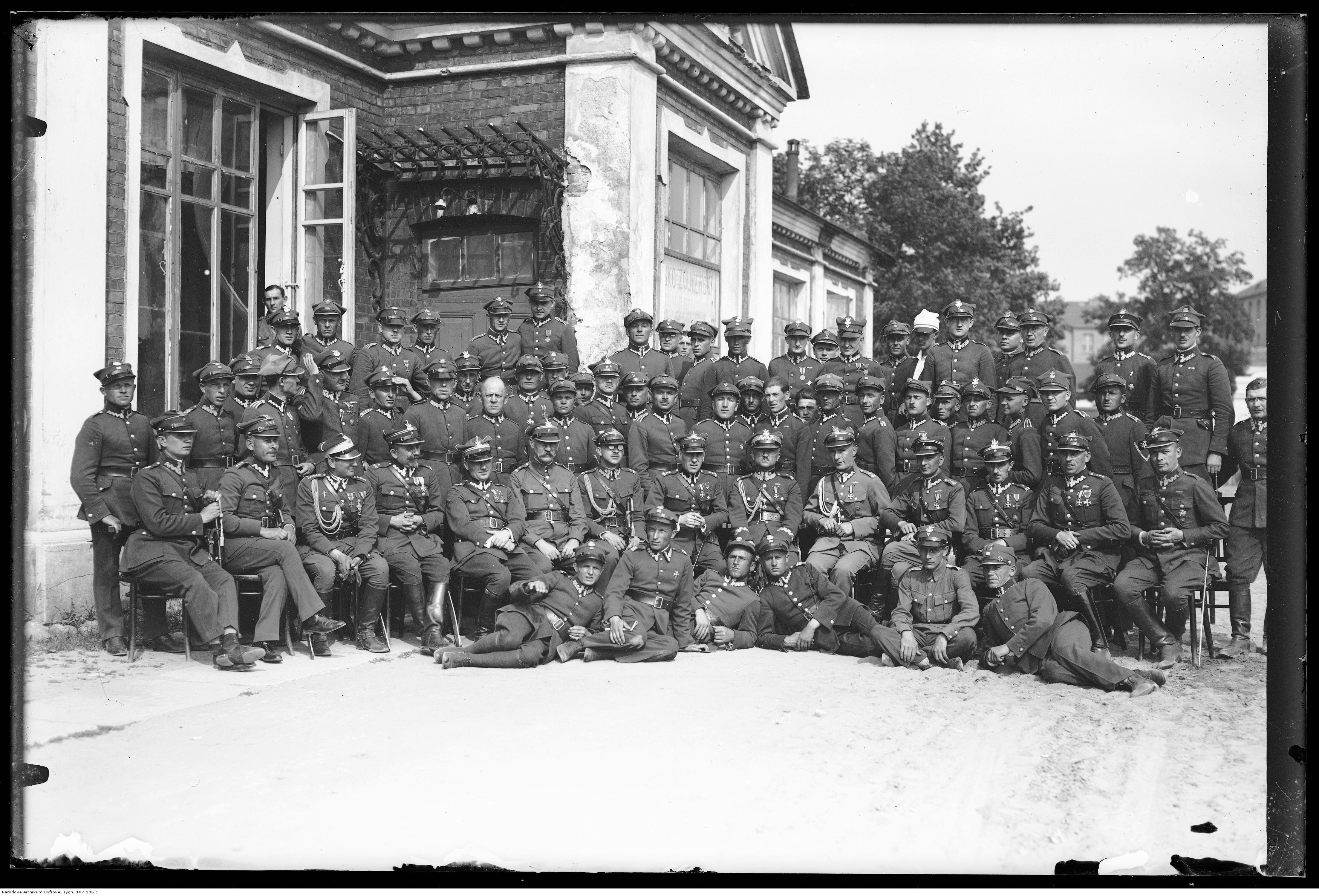 Grupa podoficerów i oficerów.